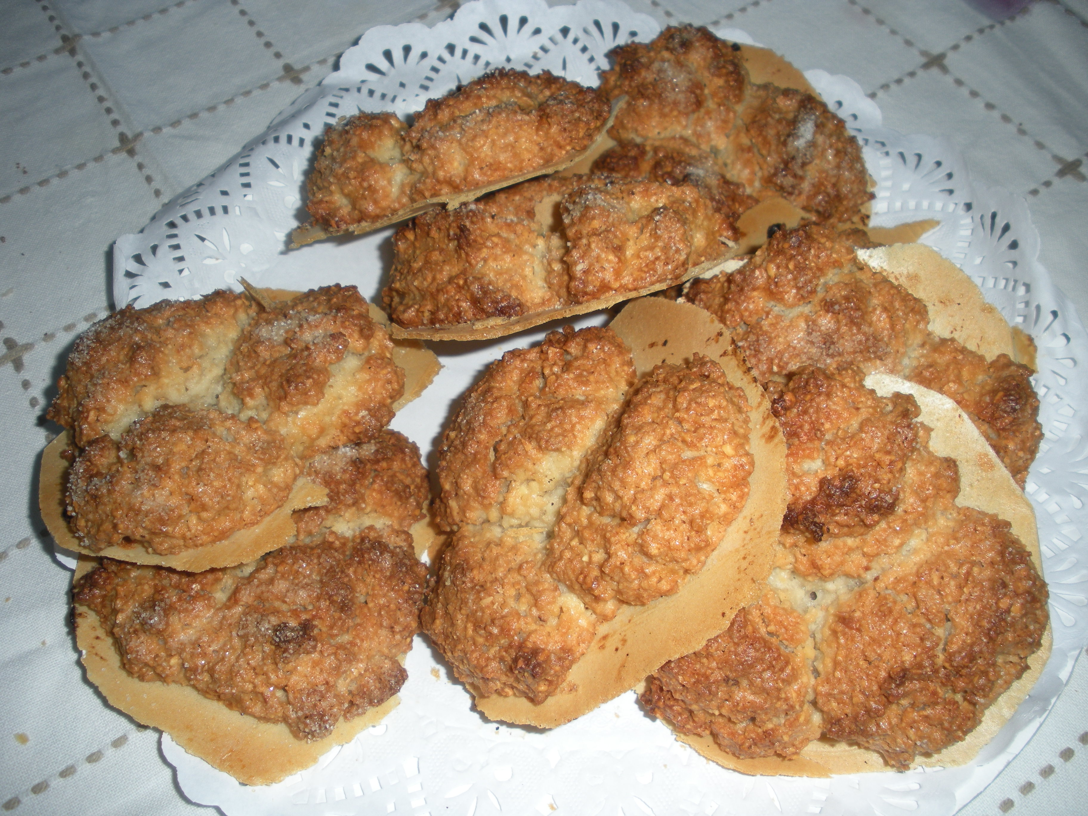 Postre: Almendrados de Allariz, Ourense, España.